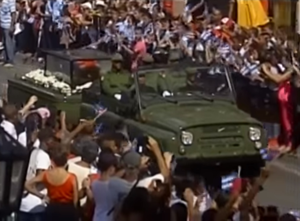 Перевоз останков Фиделя Кастро